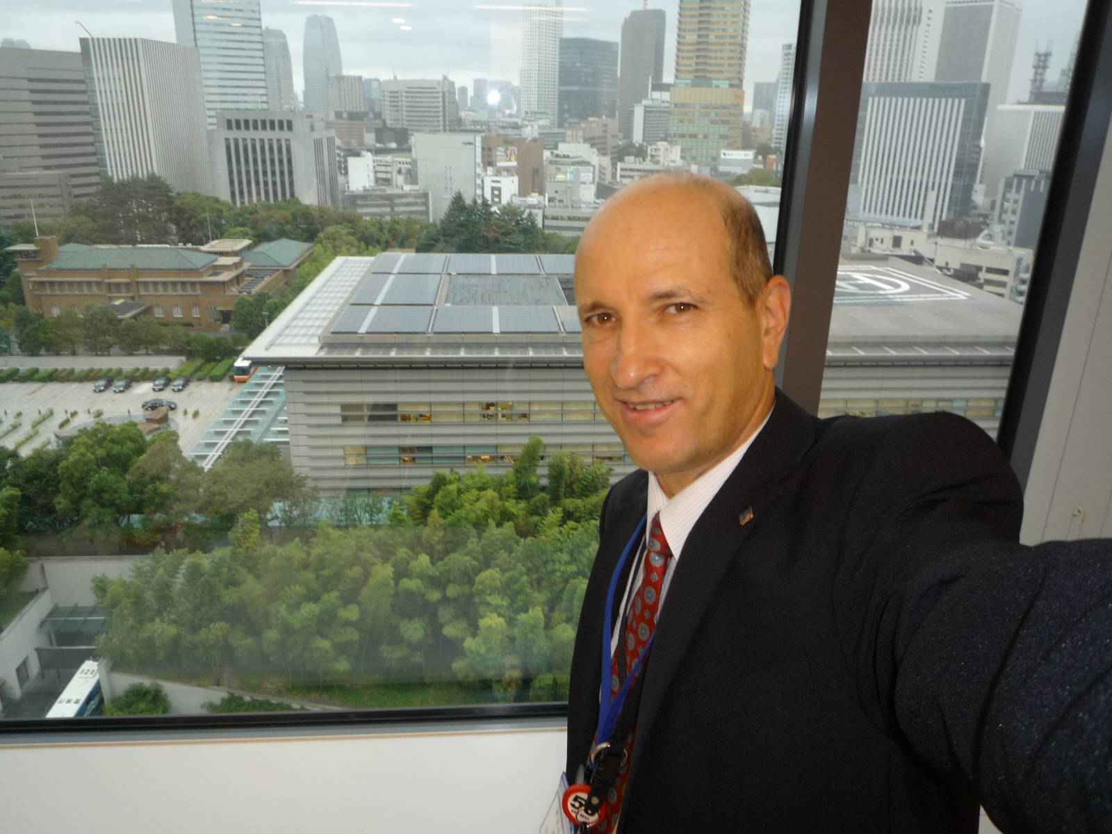 オフェル・フェルドマン２０１２